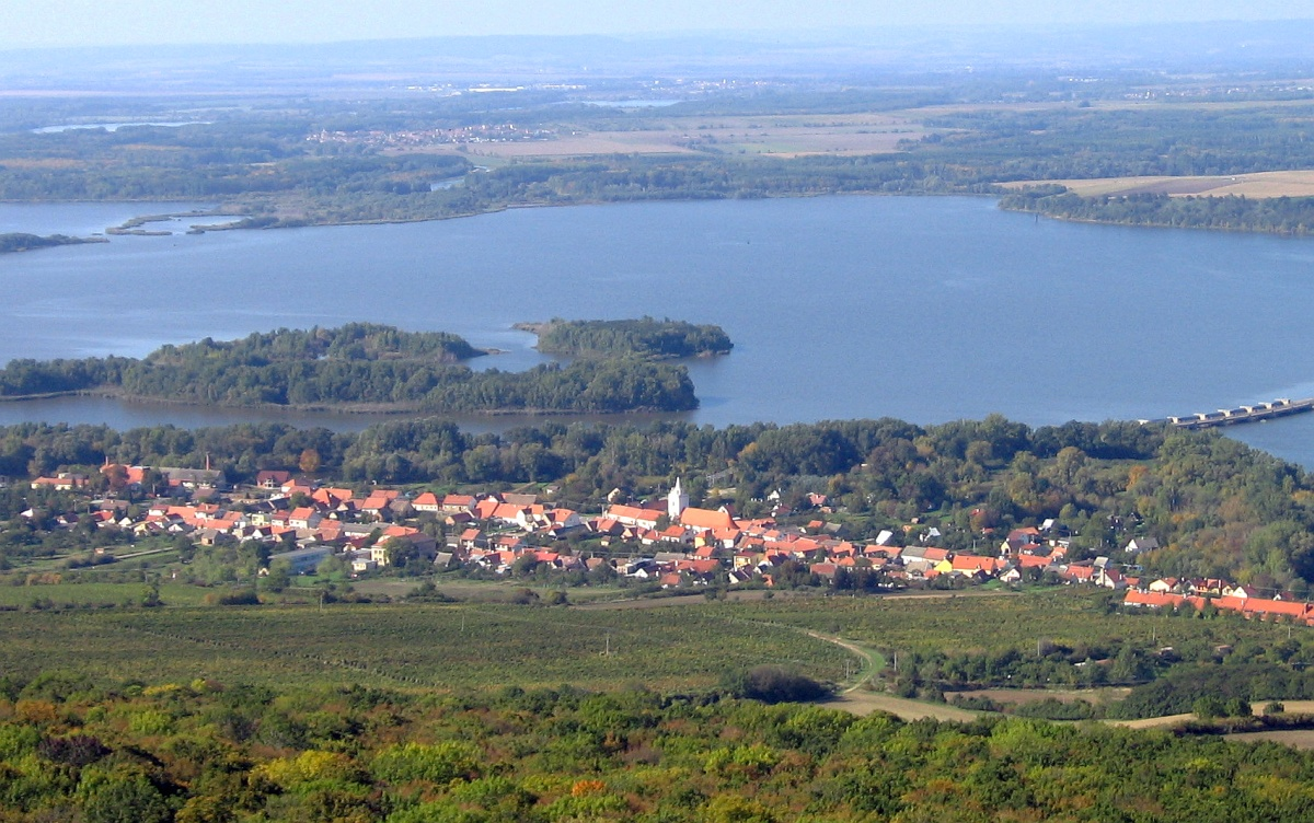 Dolní Věstonice z Děvína.